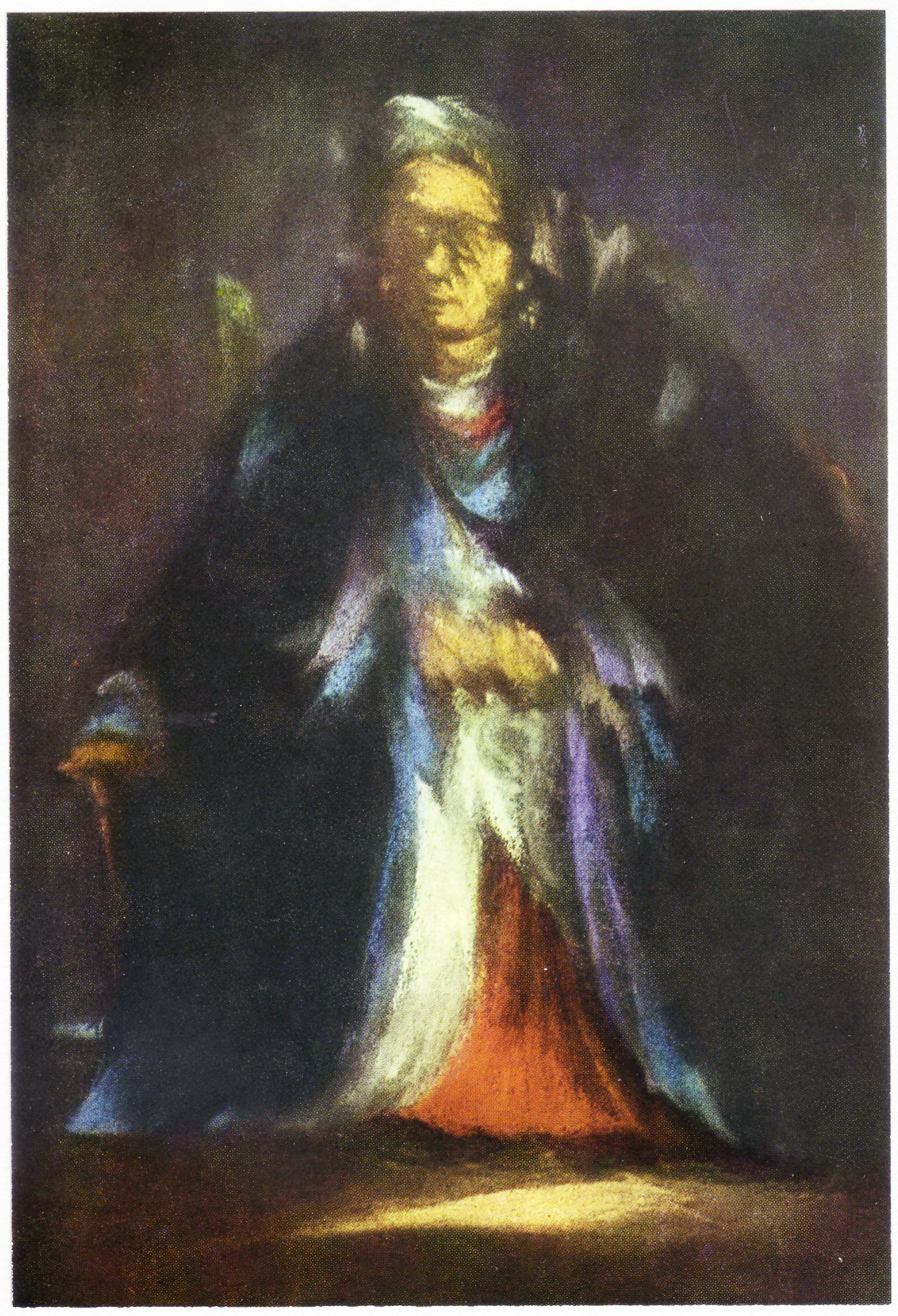 Oldwoman.jpg